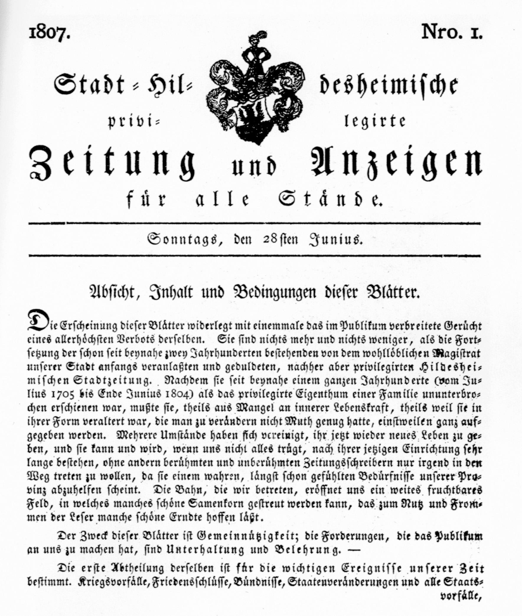 Titelseite der „Stadt-Hildesheimischen privilegierten Zeitung und Anzeigen für alle Stände" vom 28. Juni 1807.